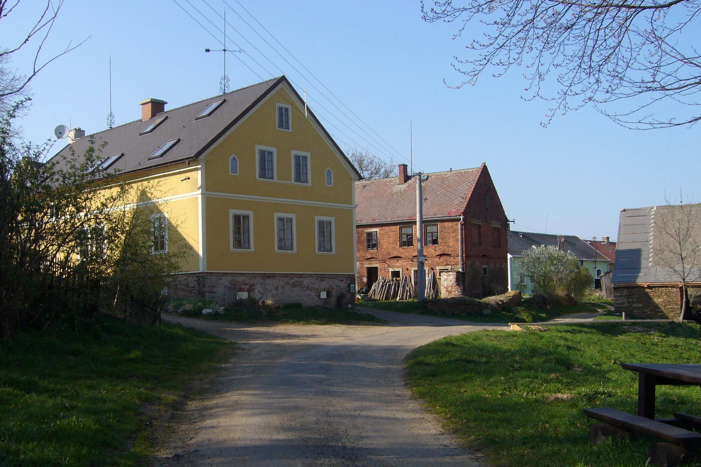 Mostec - domy nad rybníkem